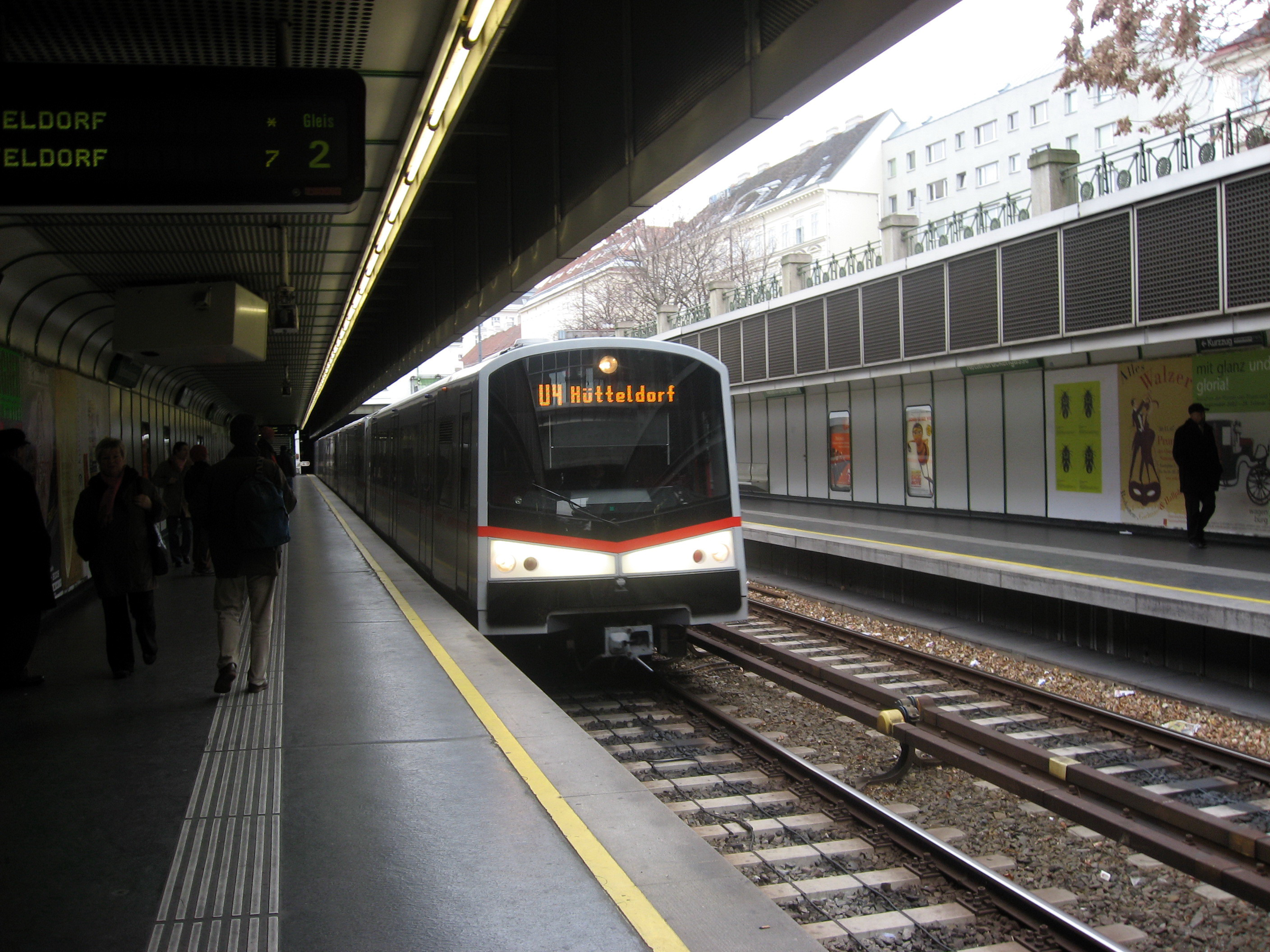 Vídeň, linka U4